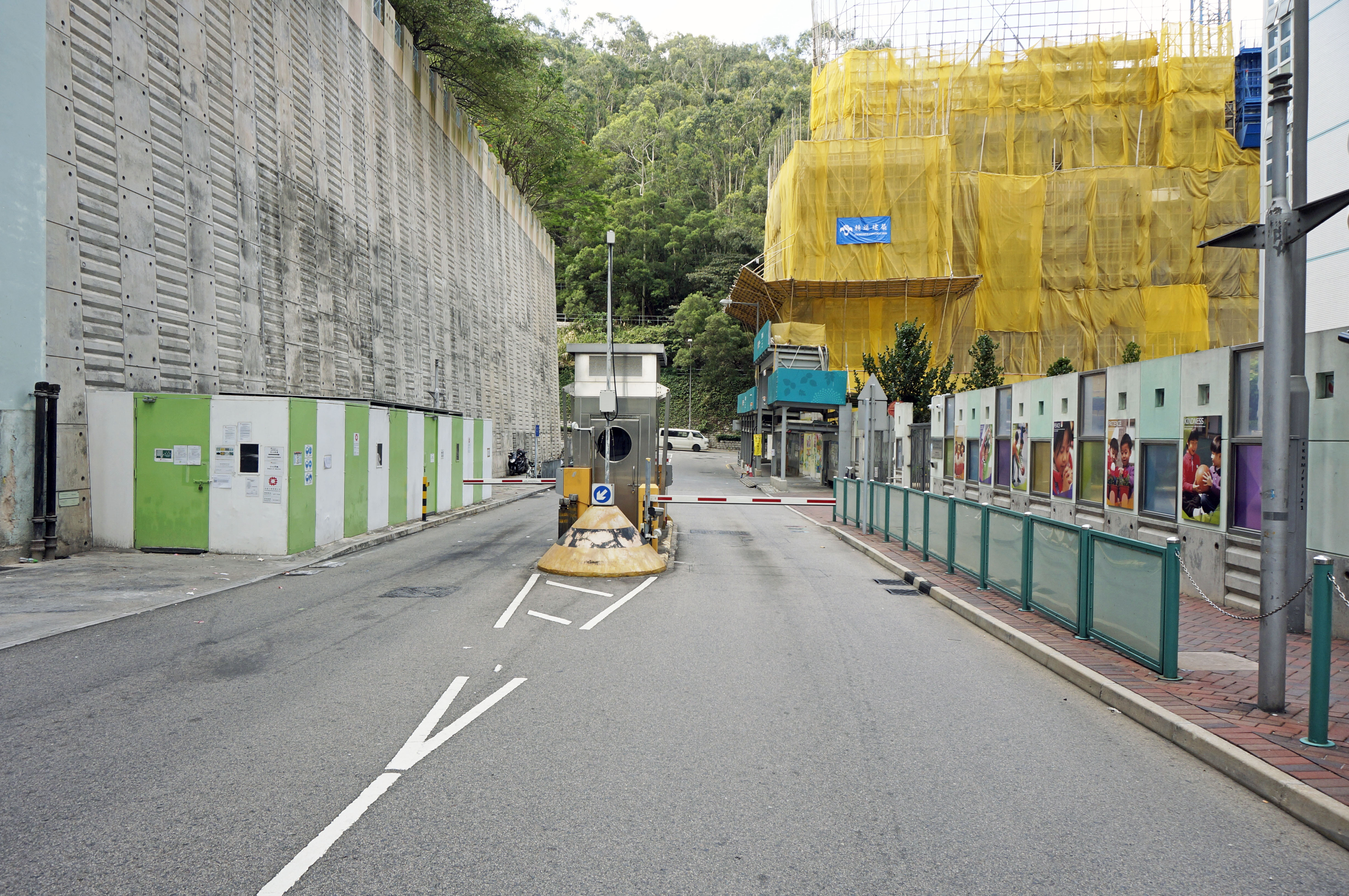 調景嶺嶺光街東段部分